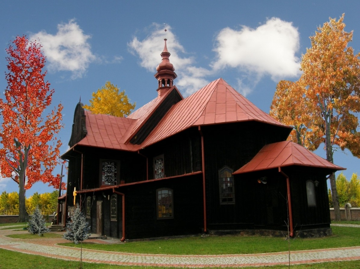 rewniany kościół parafialny śś. Wawrzyńca i Tomasza w Łobudzicach (powiat bełchatowski), woj. łódzkie